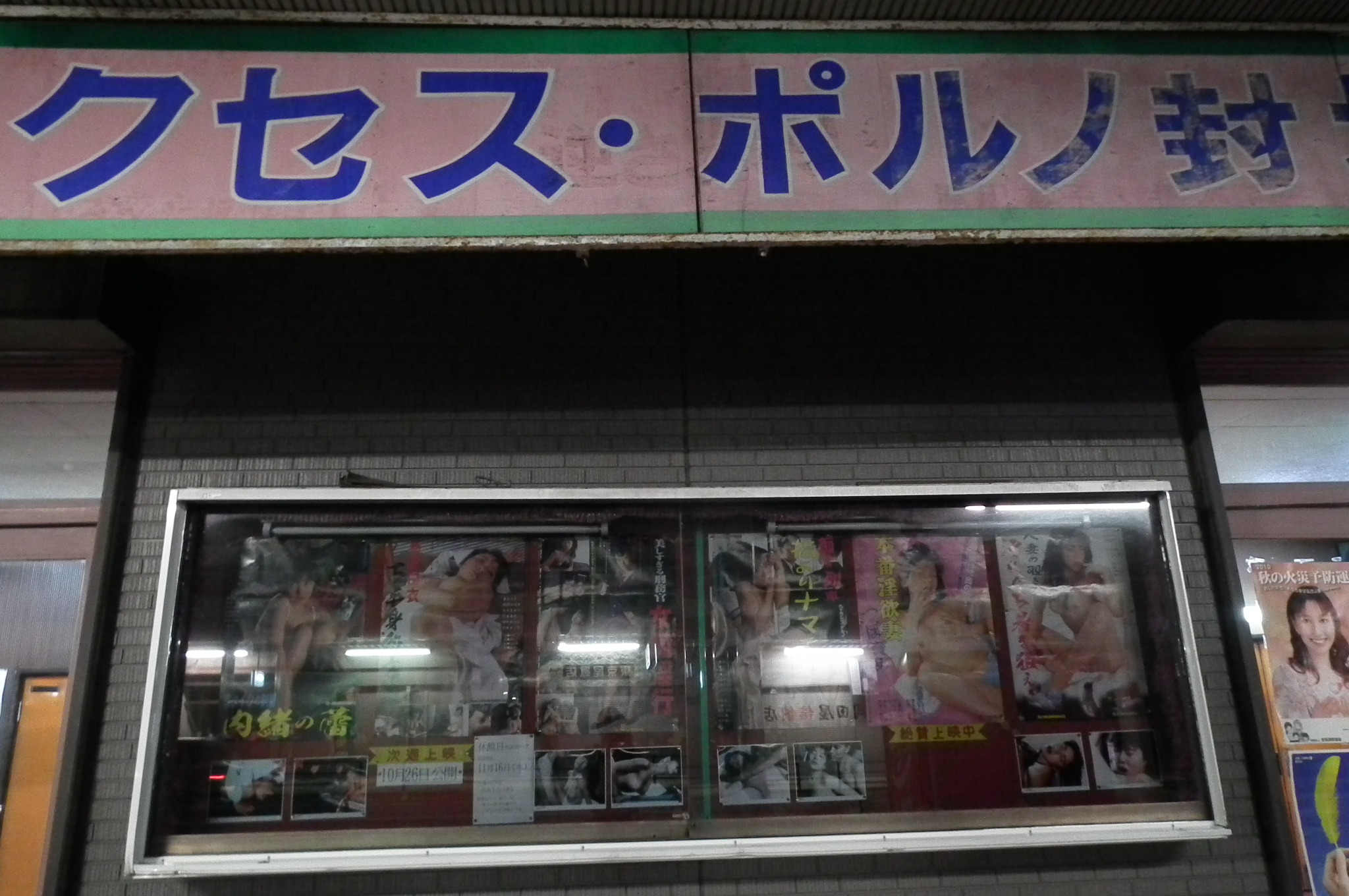 兵庫県明石市の明石本町日活。晩年は成人映画館（ポルノ映画館）。2014年閉館。